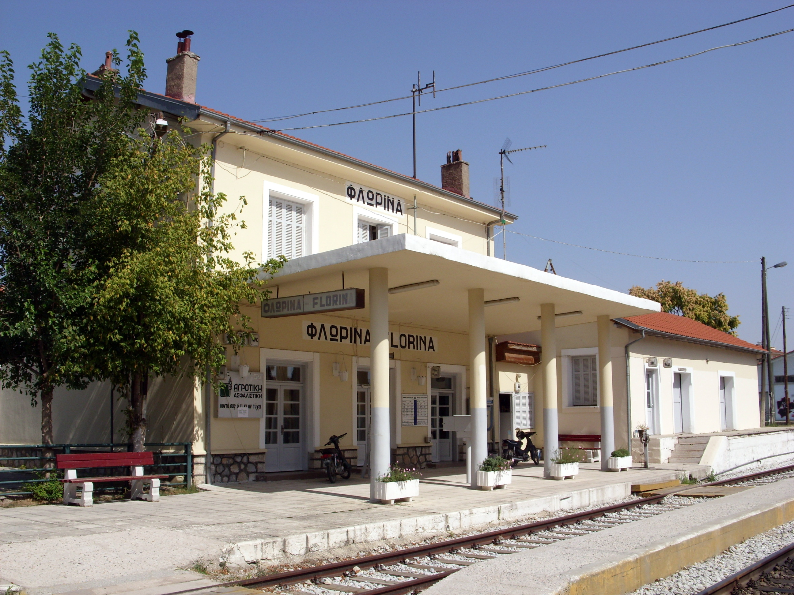 Bahnhof in Florina, Griechenland.